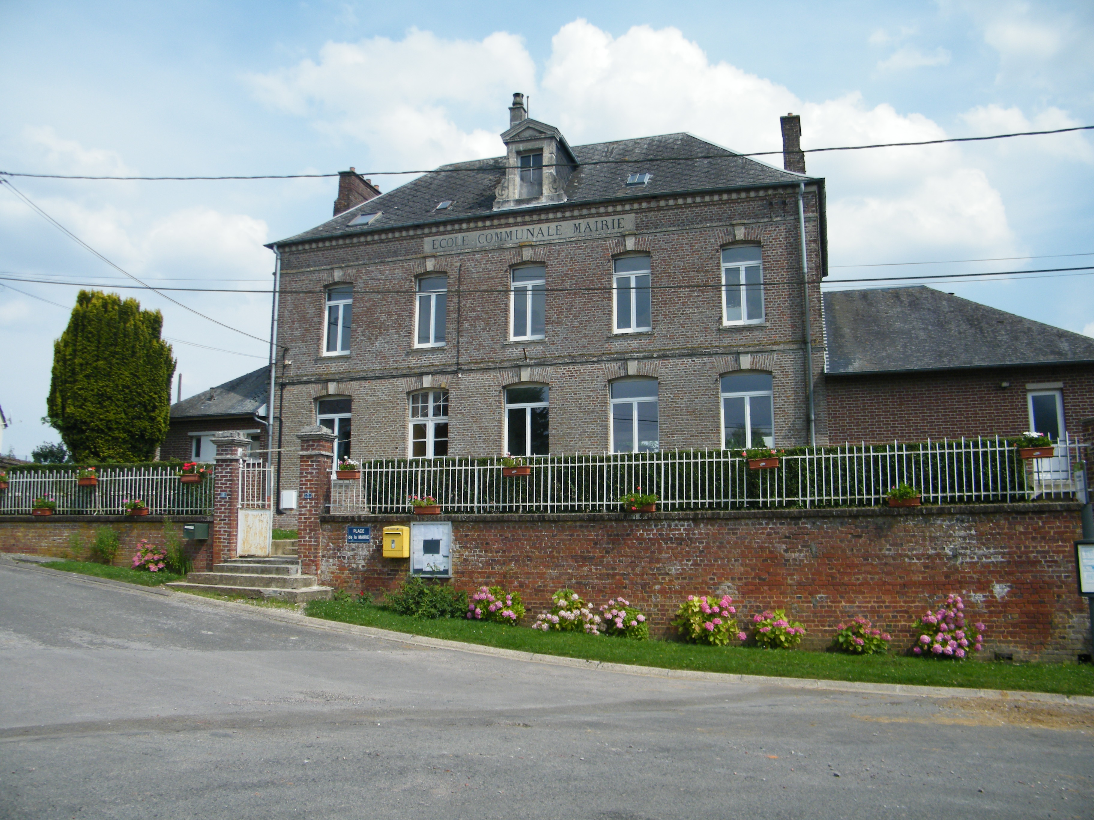 Mairie-école.